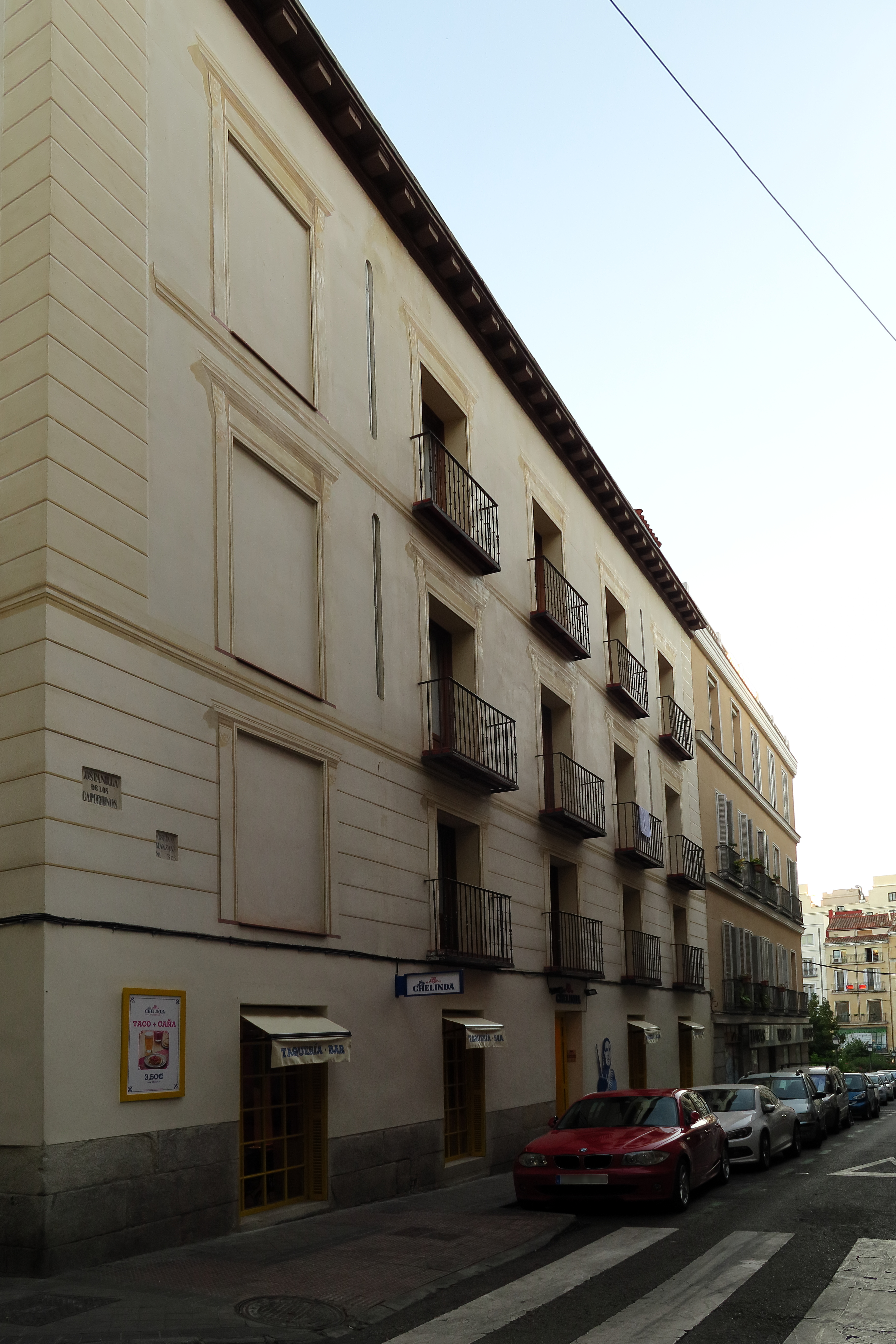 Costanilla de los Capuchinos